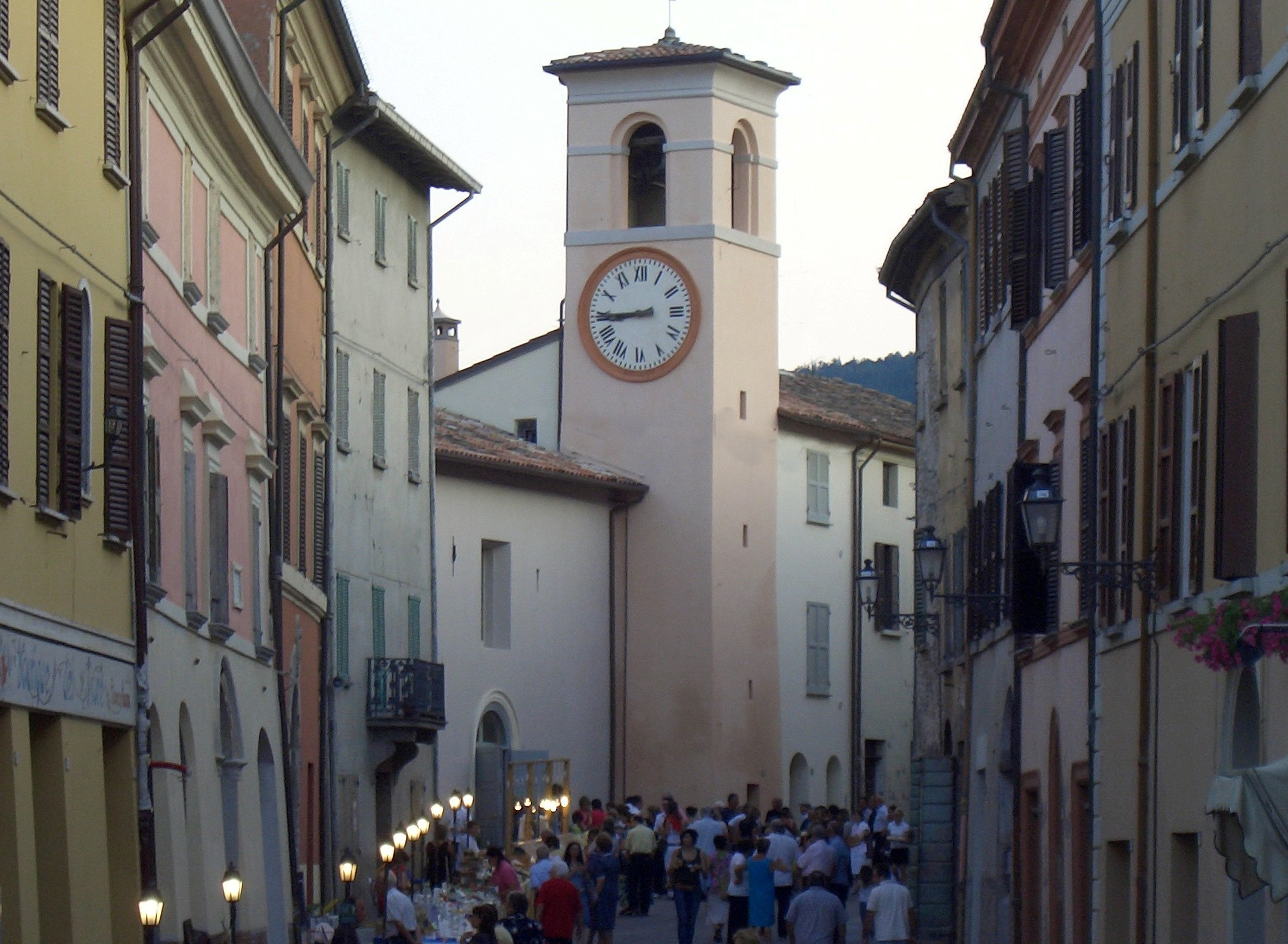 Via Giacomo Matteotti e la Torre dell'Orologio a Casola Valsenio